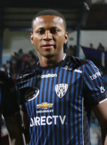 IDV vs MUNICIPAL